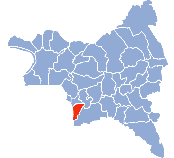 Auteur Hervé SUAUDEAU Licensing Catégorie:Cartes de Seine-saint-Denis Catégorie:Bagnolet